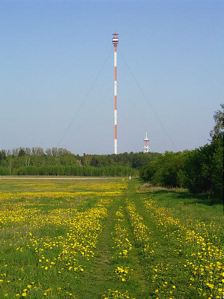 Sendetürme Berlin-Frohnau - selbst fotografiert - gemeinfrei